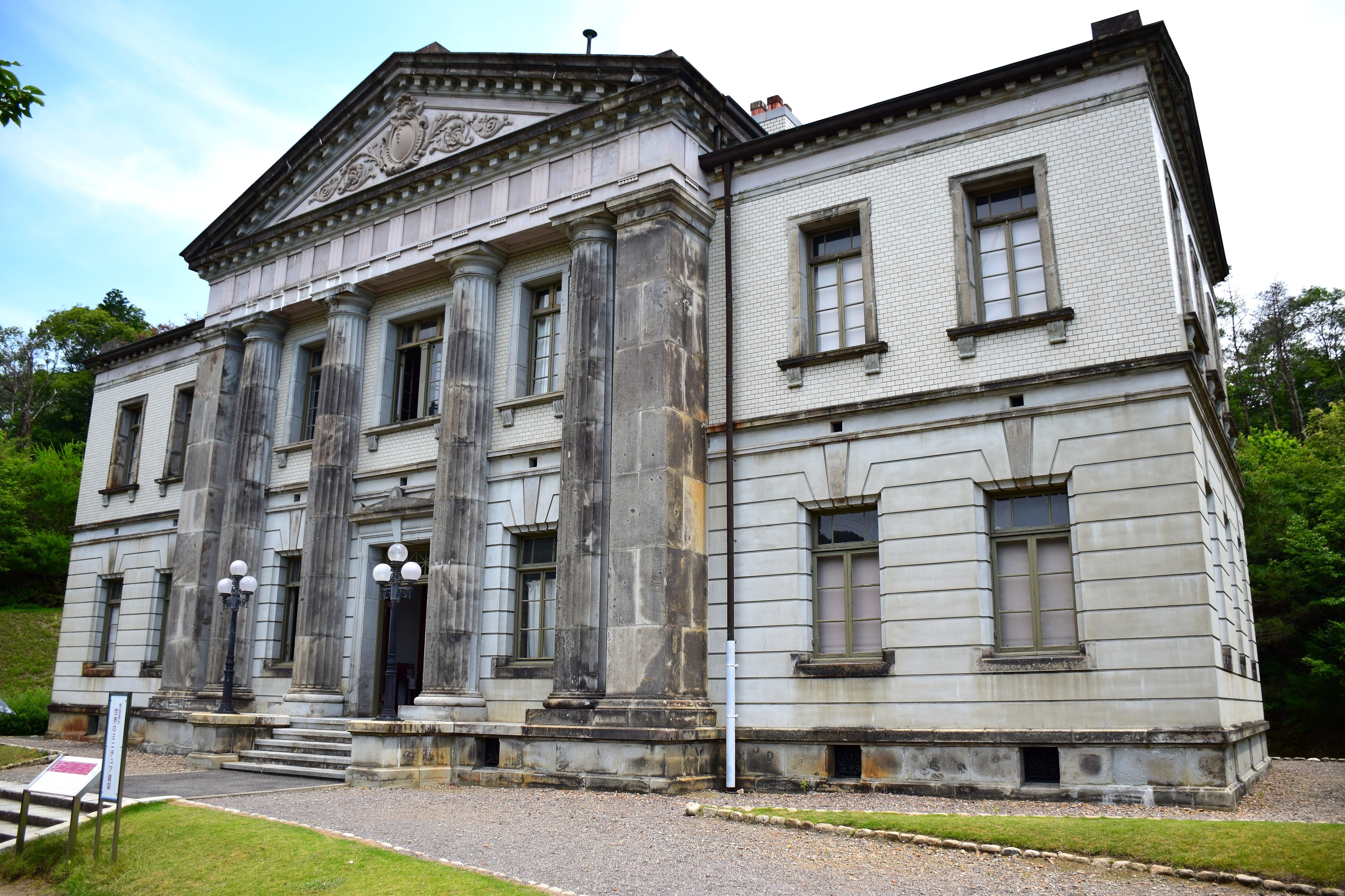 明治村 内閣文庫